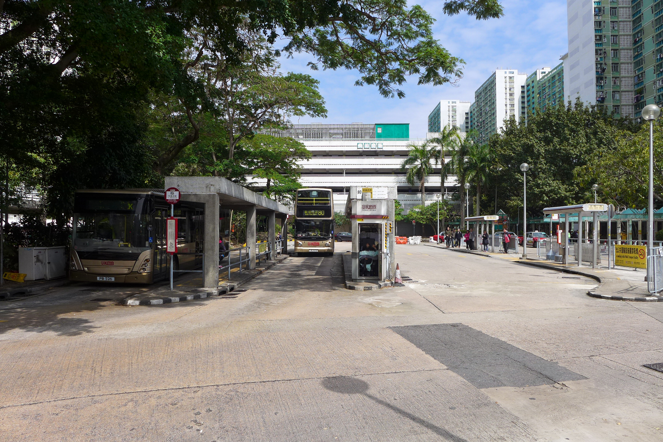 Mei Lam Estate Bus Terminal